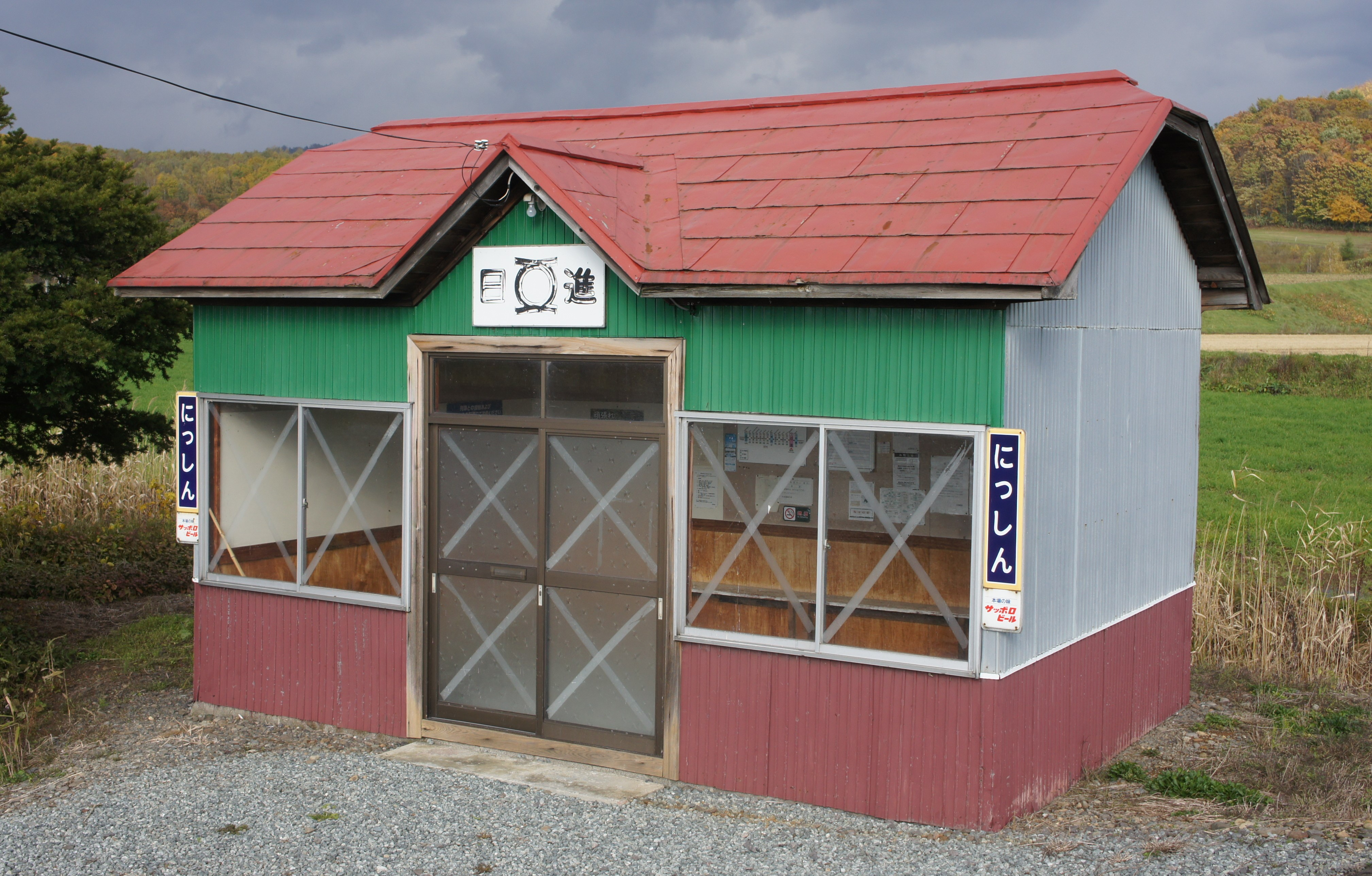 JR宗谷本線・日進駅の駅舎 Sony NEX-3